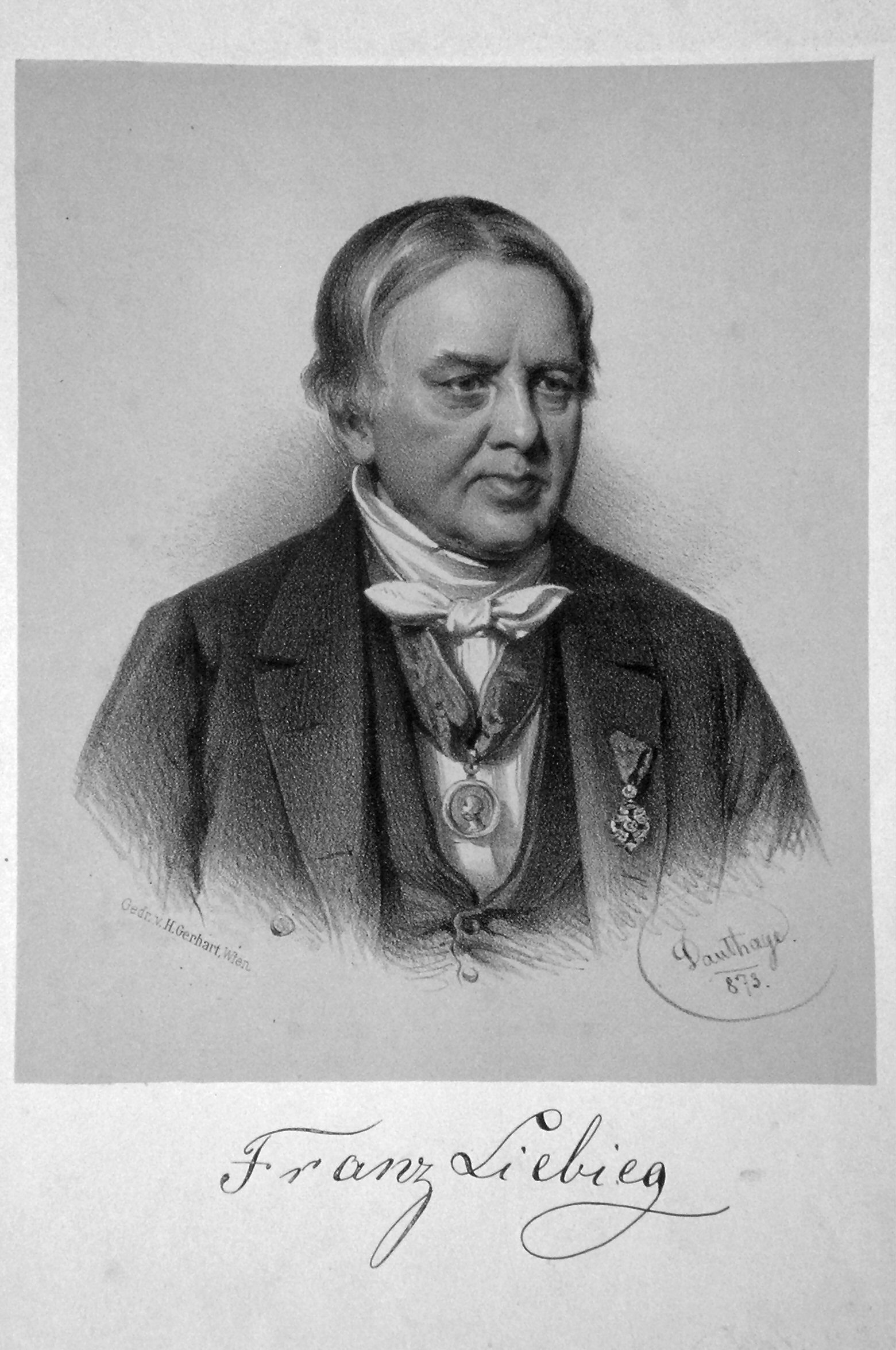 Franz von Liebig d. Ä. (1799-1878) österreichisch-böhmischer Industrieller. Lithographie von Adolf Dauthage, 1873